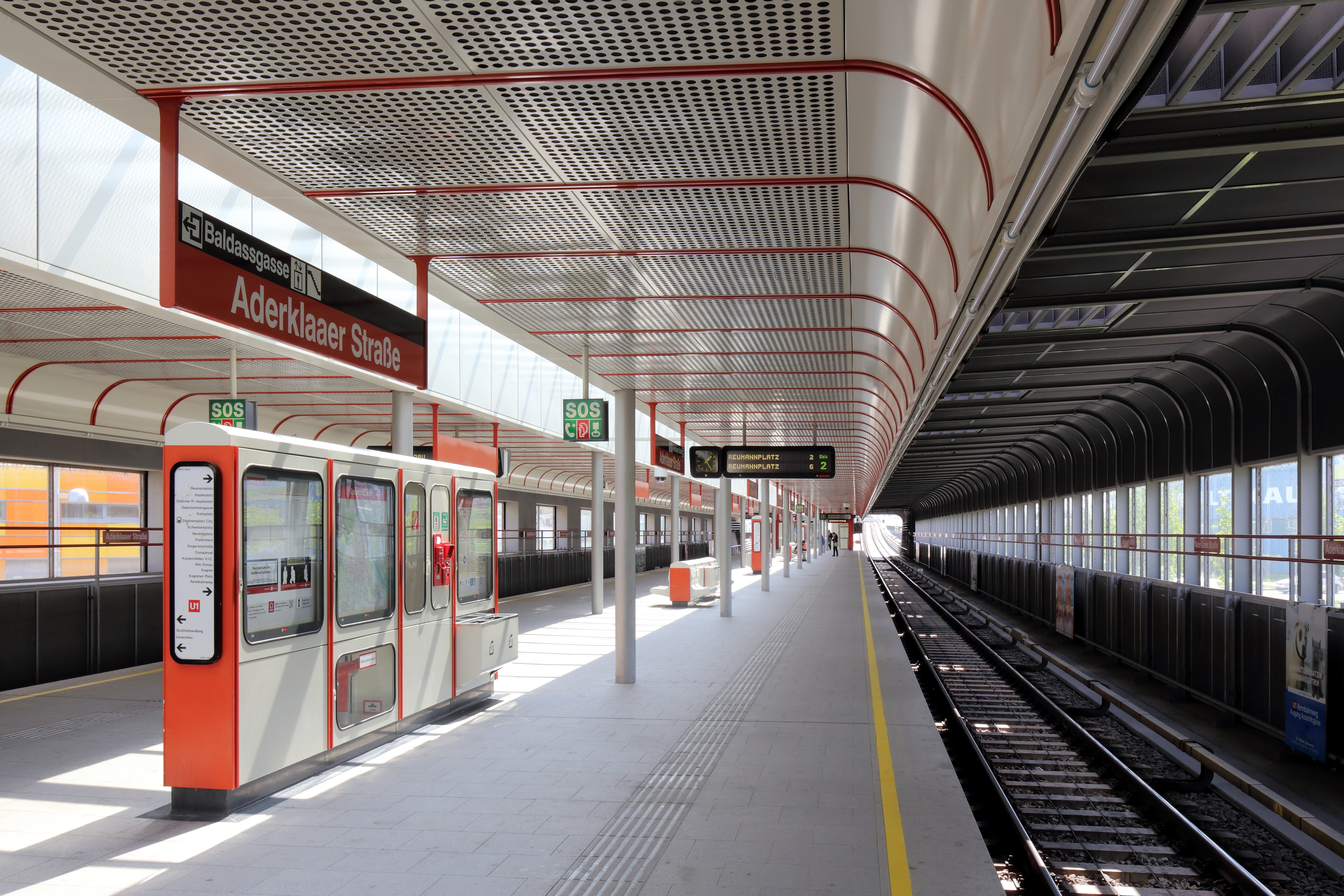 U-Bahn-Station Aderklaaer Straße der U1 in der österreichischen Bundeshauptstadt Wien. Die Station wurde im Zuge der U1-Verlängerung am 2. September 2006 eröffnet.